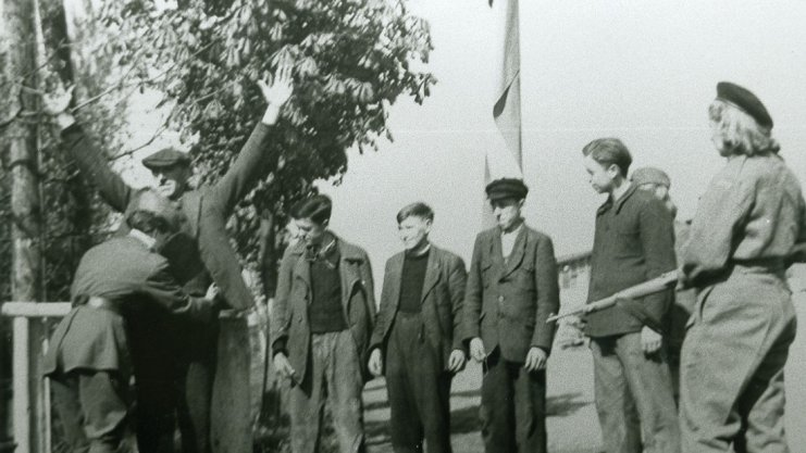 Polacy w Haren rewidują Niemców. Dawnym mieszkańcom nie wolno było wchodzić do Maczkowa, a posiadacze przepustek mogli poruszać się tylko po wyznaczonych ulicach. Do przypadków mszczenia się na Niemcach dochodziło bardzo rzadko. Natomiast niemieccy rolnicy, którzy pomagali polskim...